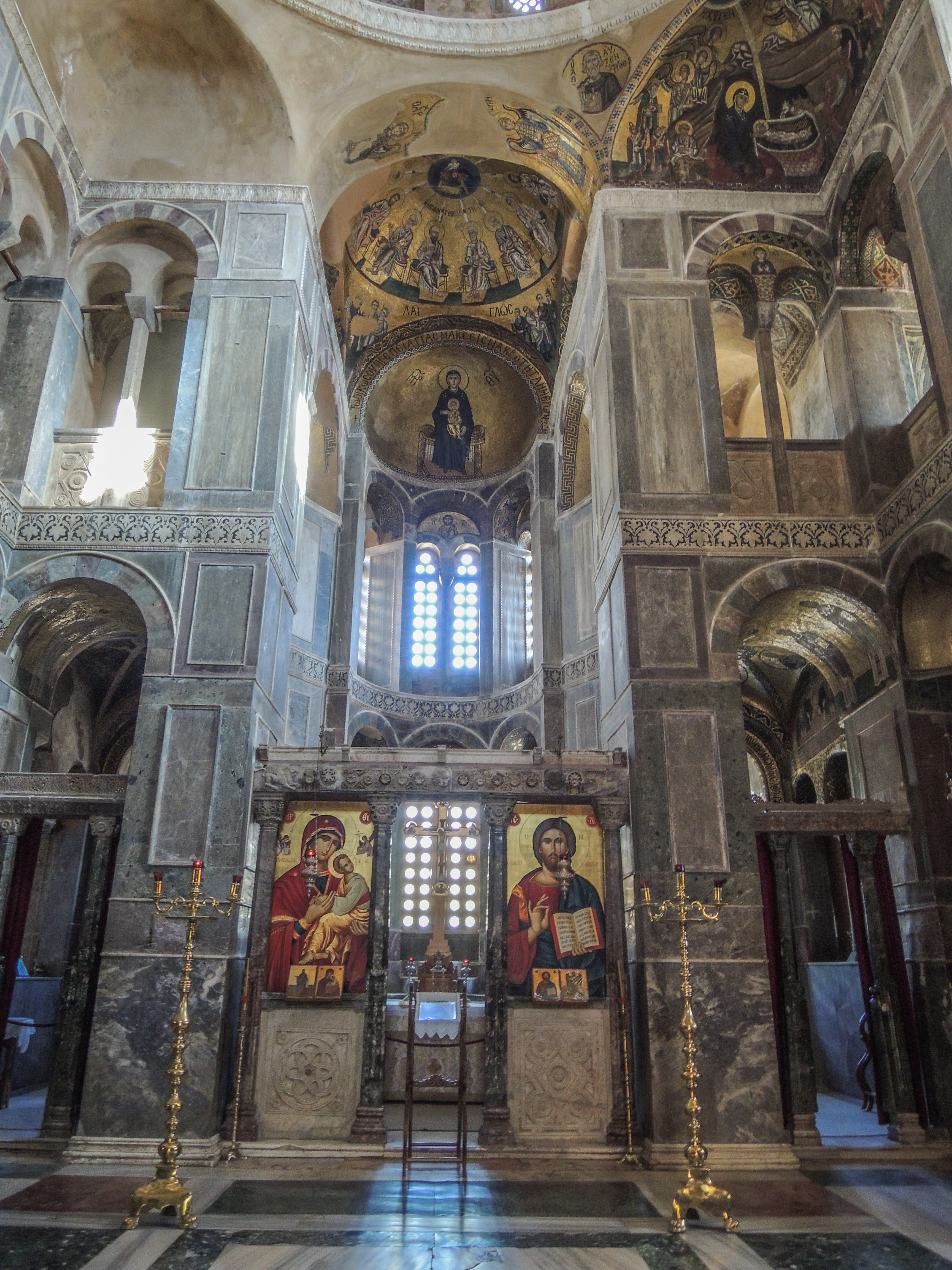 Монастырь Осиос Лукас